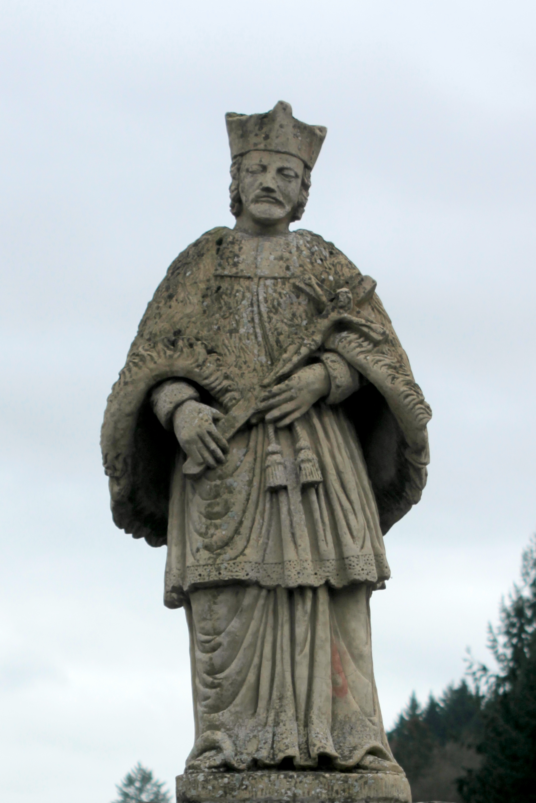 De Bommenzinnes zu Veianen op der Bréck